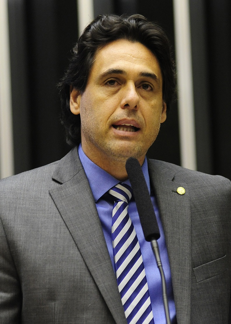 Danrlei em abril de 2015.